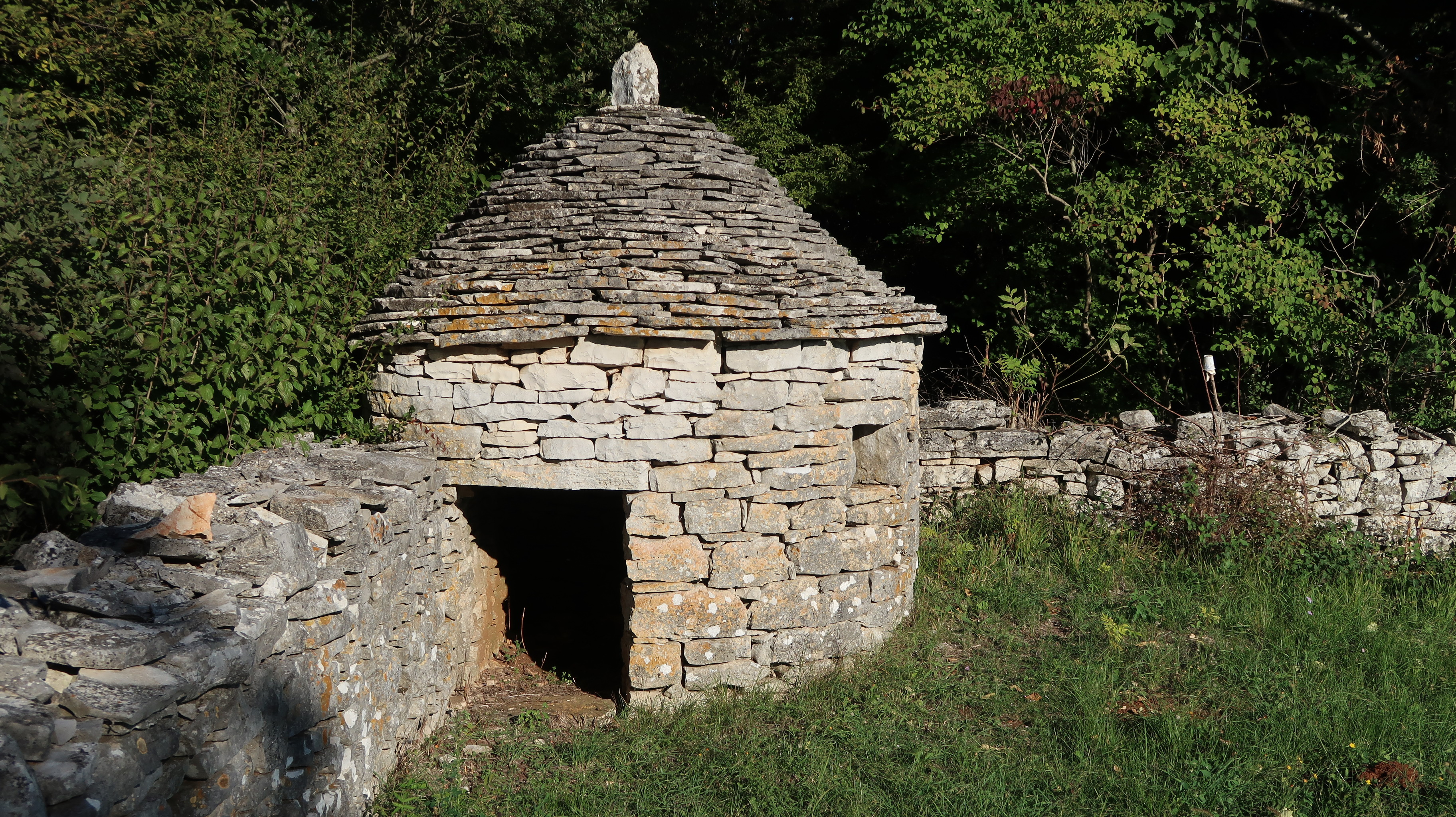 Kroatien (HR) - Gespanschaft Istrien (036) - Kanfanar: Kažun (I), östlich des Friedhofs; Ansicht von Westen